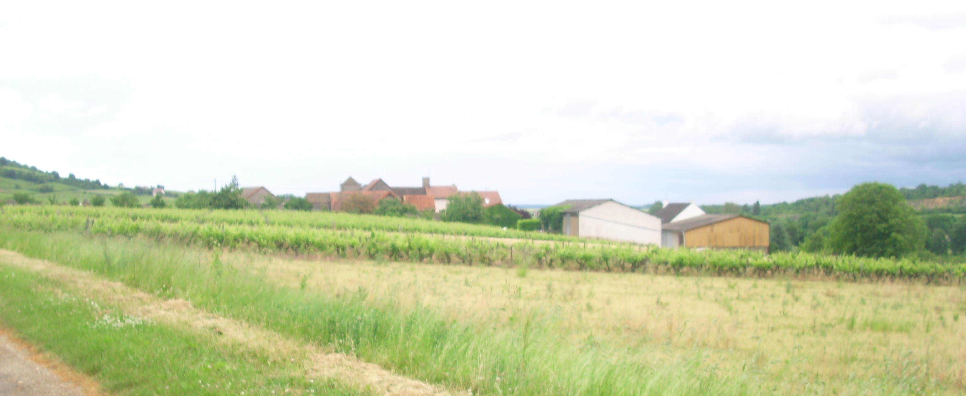 Parcelles de vignes à Saint-Jean-de-Vaux (71)